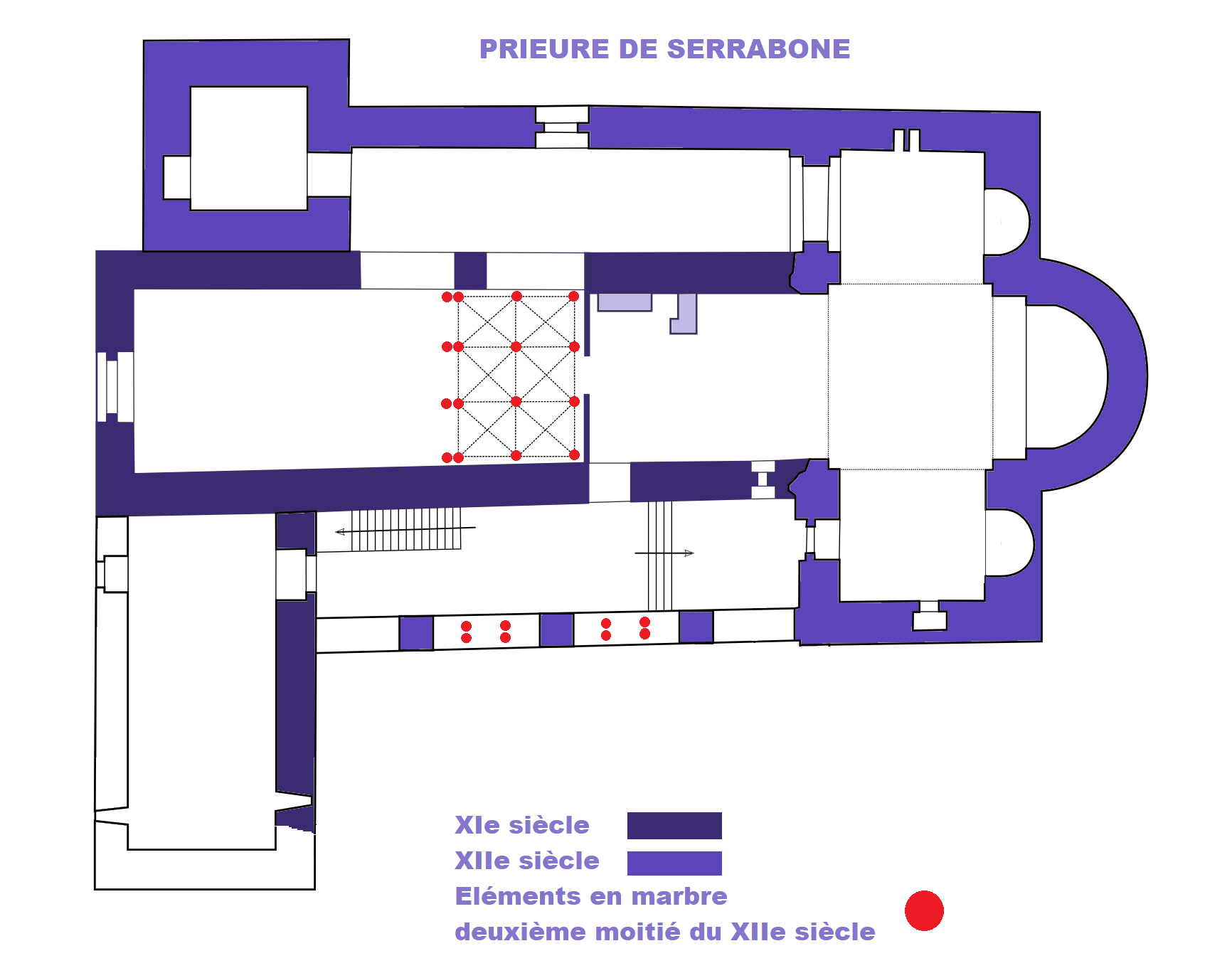 Prieuré de Serrabone, plan (image Commons modifiée)